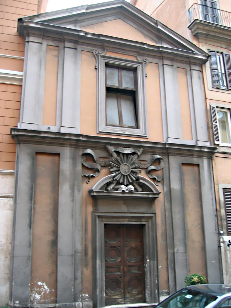 Facciata della chiesa di Sant'Andrea degli Scozzesi, Roma